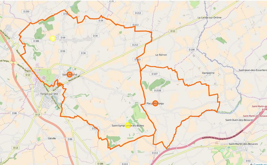 Carte de la commune nouvelle de Saint-Amand-Villages